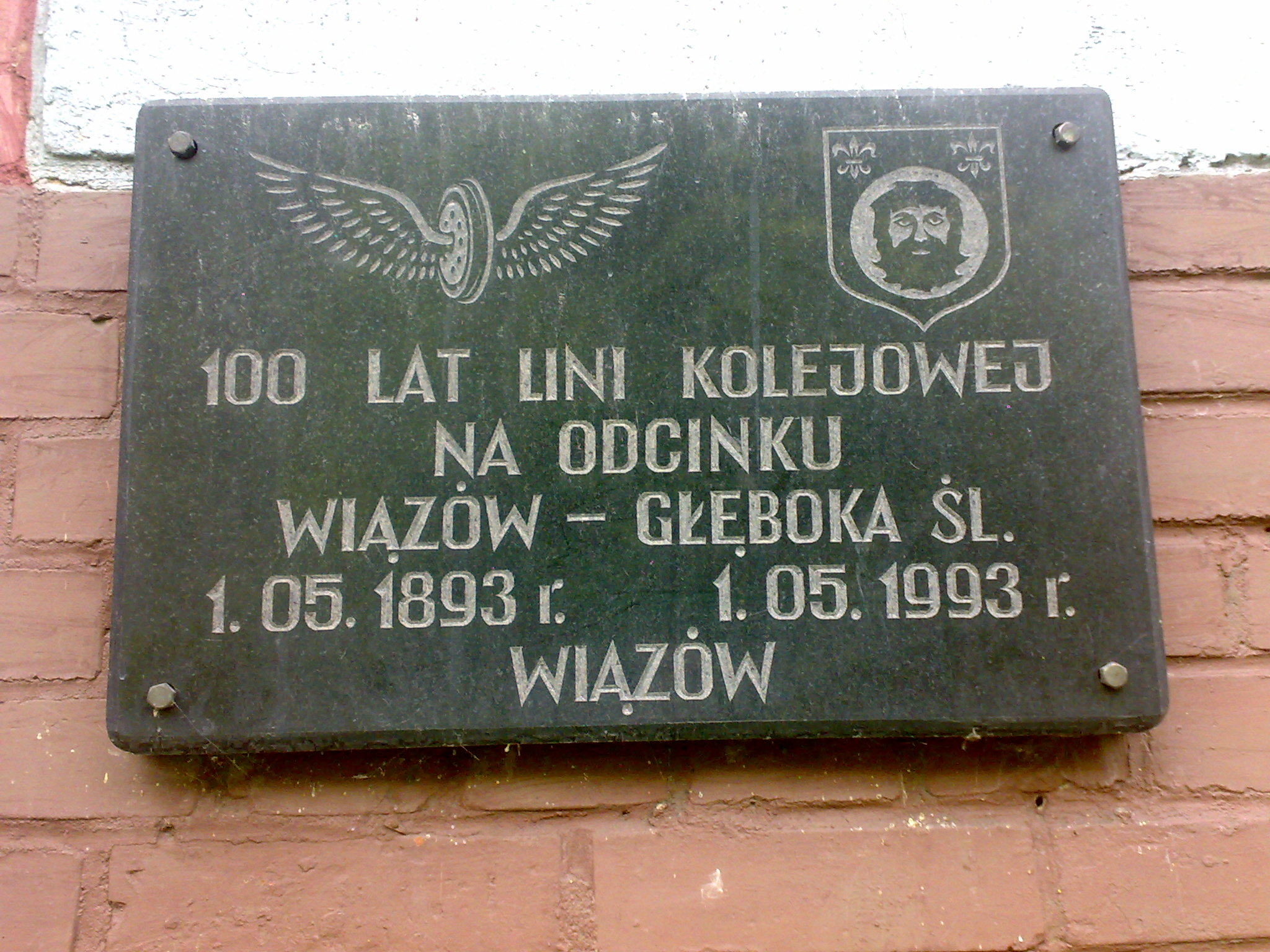 Tablica pamiątkowa znajdująca się na budynku stacji Wiązów